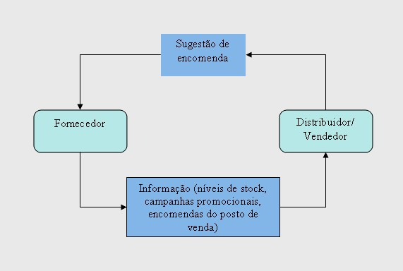 CRP